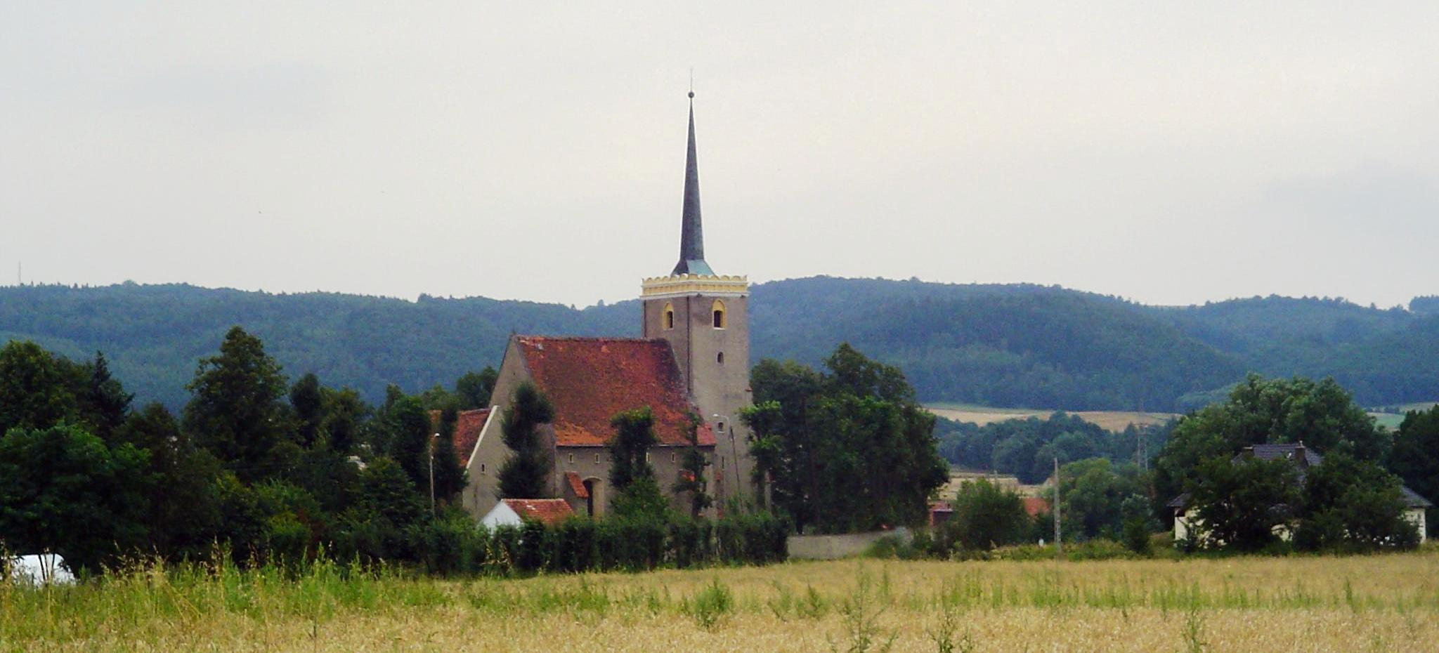 Witoszów Dolny - kościół parafialny p.w. Nawiedzenia NMP (zabytek nr rejestr. A/1681/343 z dn. 13.11.1956)